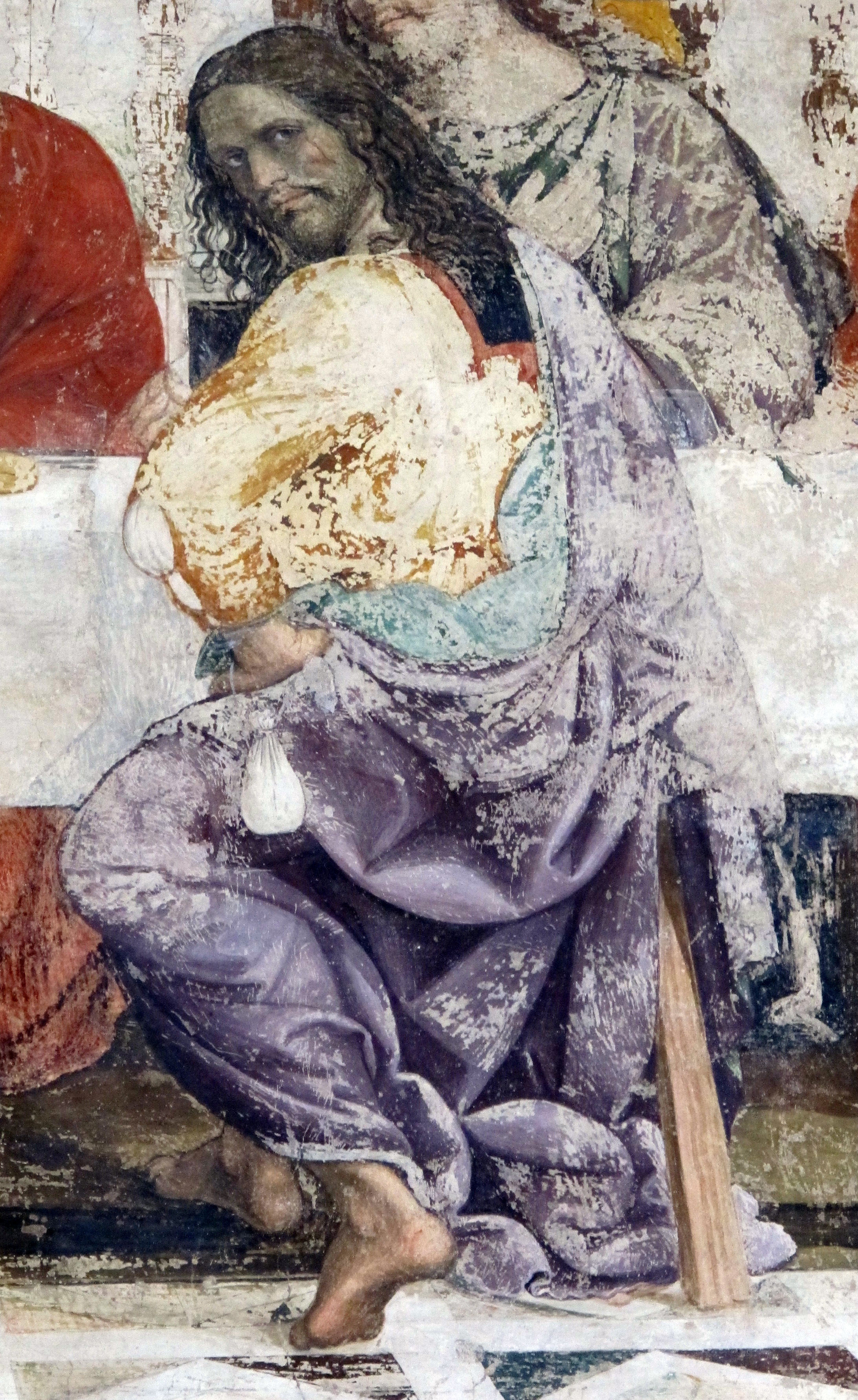 San Bartolomeo a Monte Oliveto - Firenze